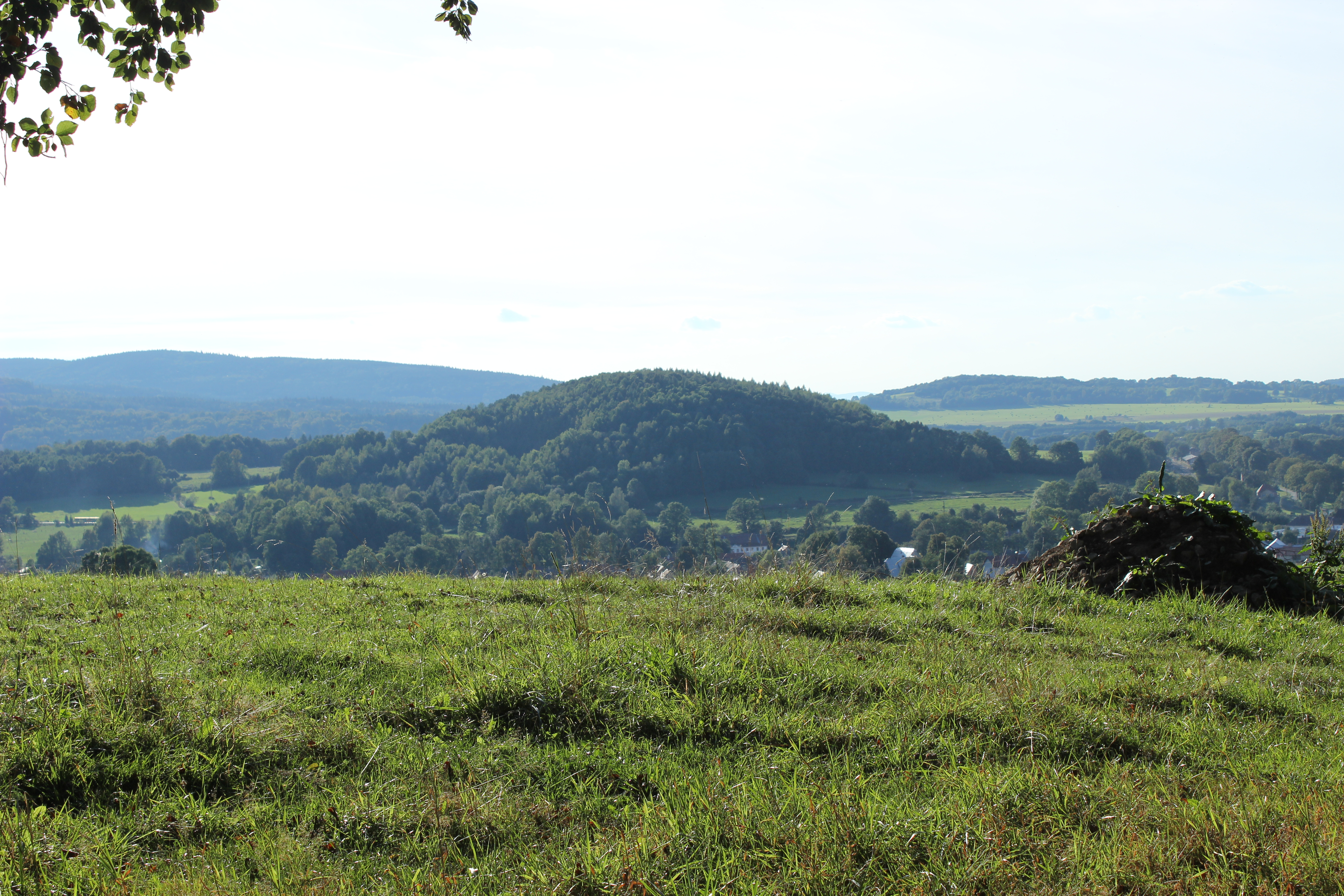 Vápenný vrch zachycený od Luisina slunečního kříže na Pekelském vrchu.